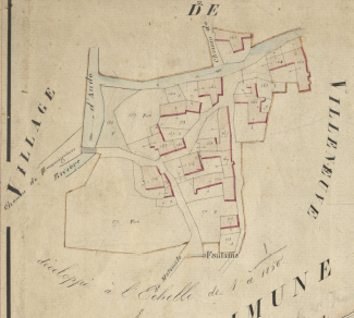 Vilanova de Formiguera en el Cadastre Napoleònic del 1812 (Arxius Departamentals dels Pirineus Orientals)